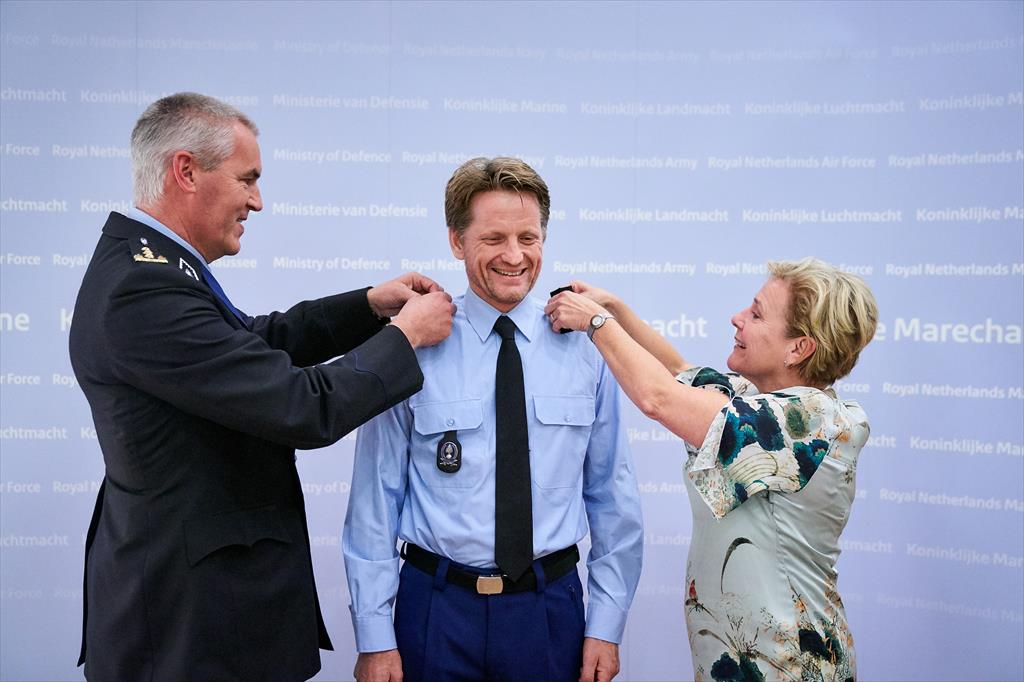 Prins Pieter-Christiaan is sinds gisteren reservekolonel bij de Koninklijke Marechaussee. Minister van Defensie Ank Bijleveld-Schouten en Commandant Koninklijke Marechaussee luitenant-generaal Harry van den Brink hebben hem bevorderd.